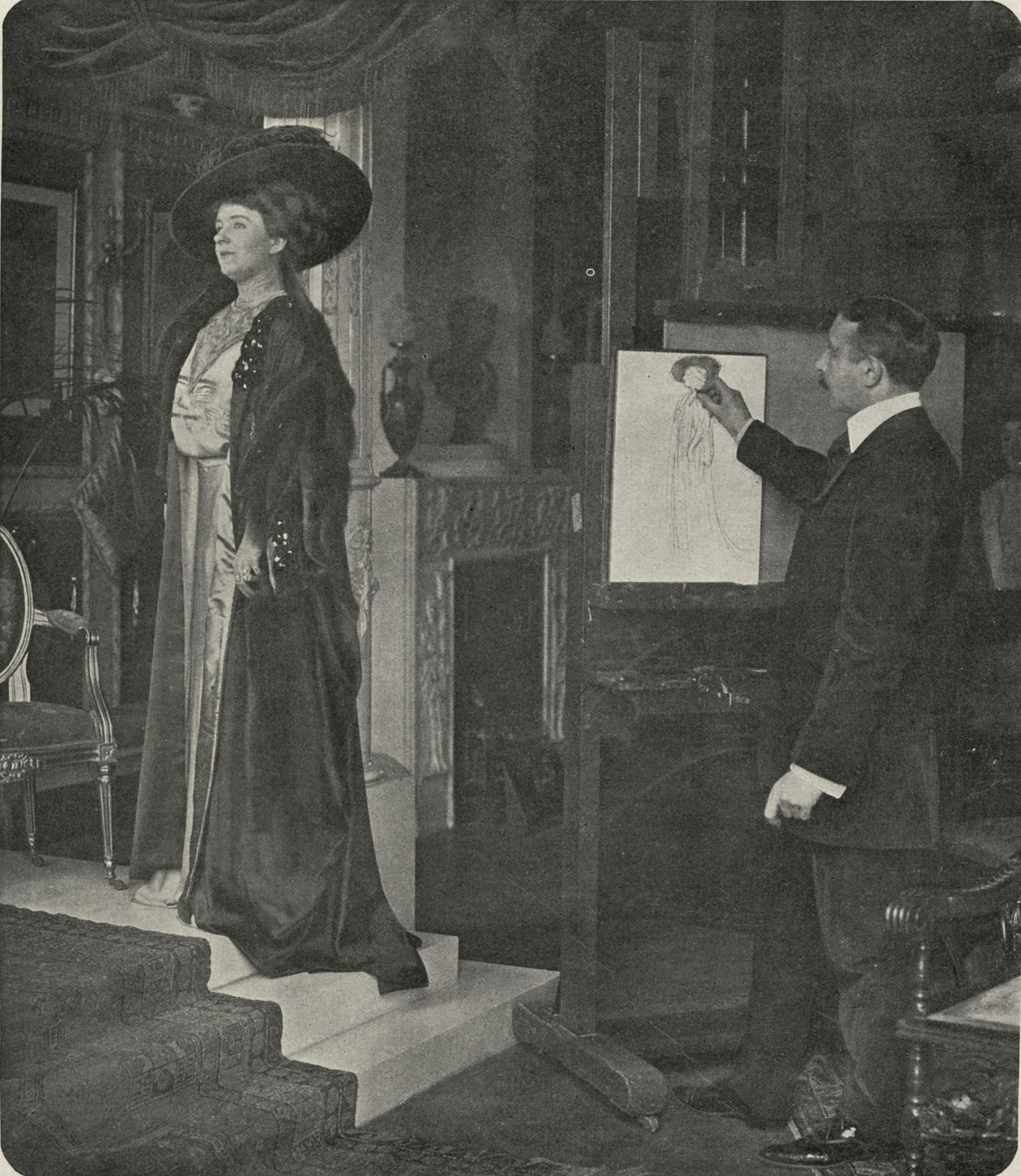 De schilder Antoon van Welie werkend aan een portret van zangeres Alys Lorraine.